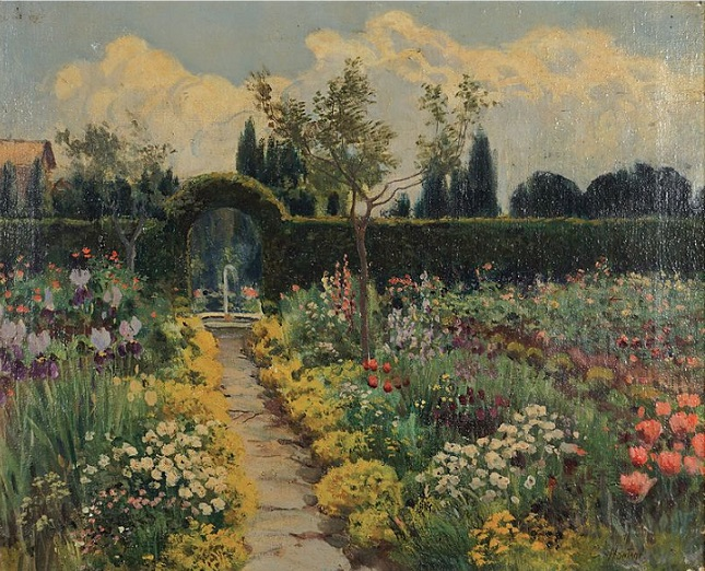 "Giardino", olio su tela, 50 x 60 cm., firmato, coll. privata